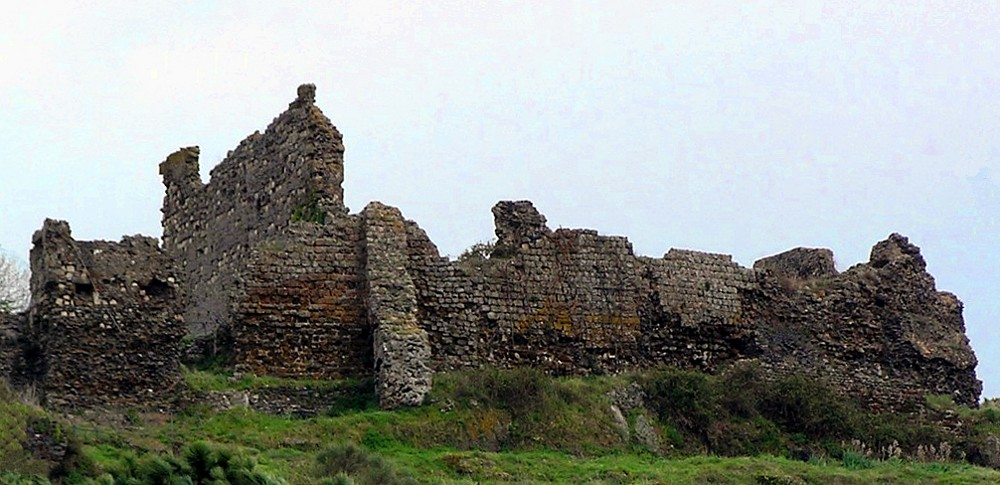 andrea mariotti, Trevignano Romano, i ruderi del castello, la "rocca", di pubblico dominio.